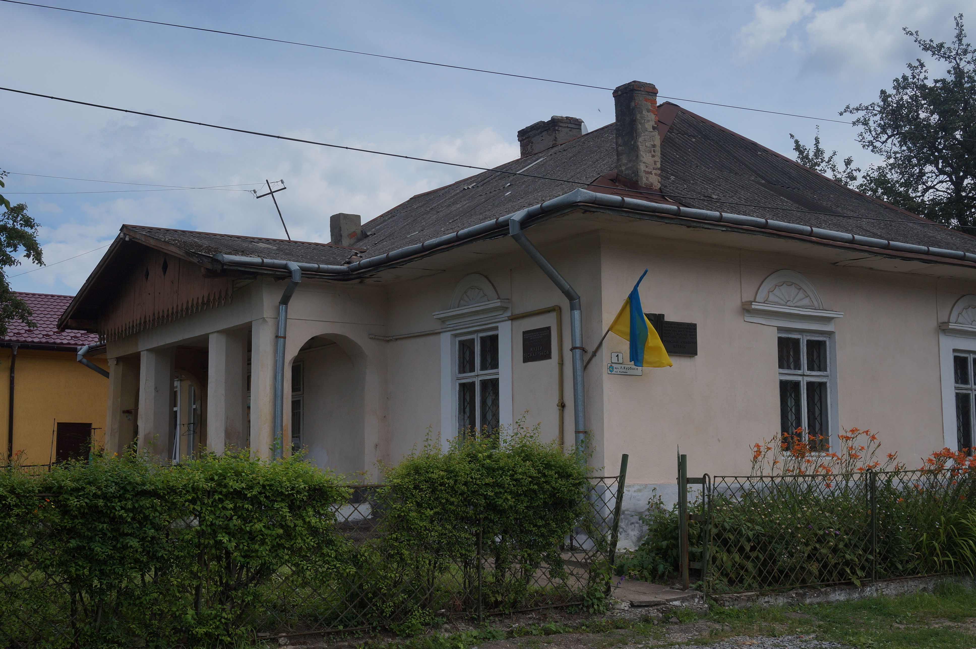 Житловий будинок (мур.), Самбір, вул. Сонячна,1 (Курбаса)